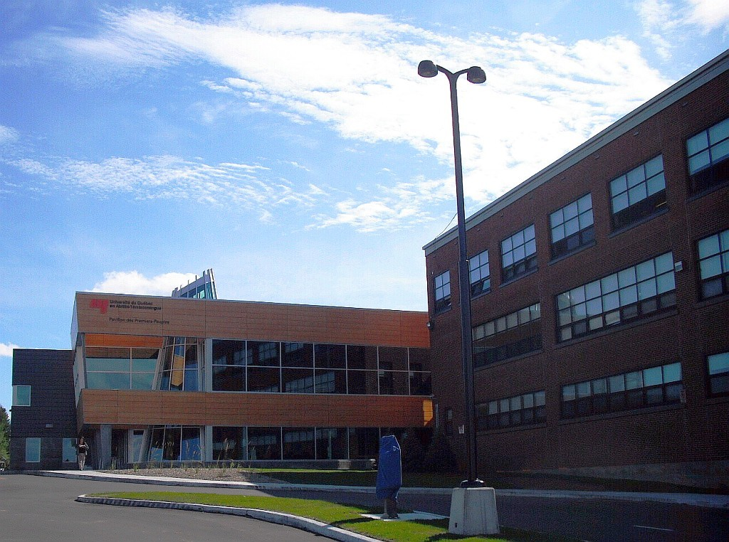 Vue le pavillon des premières nations de l'UQAT, Val d'Or, Québec, Canada.